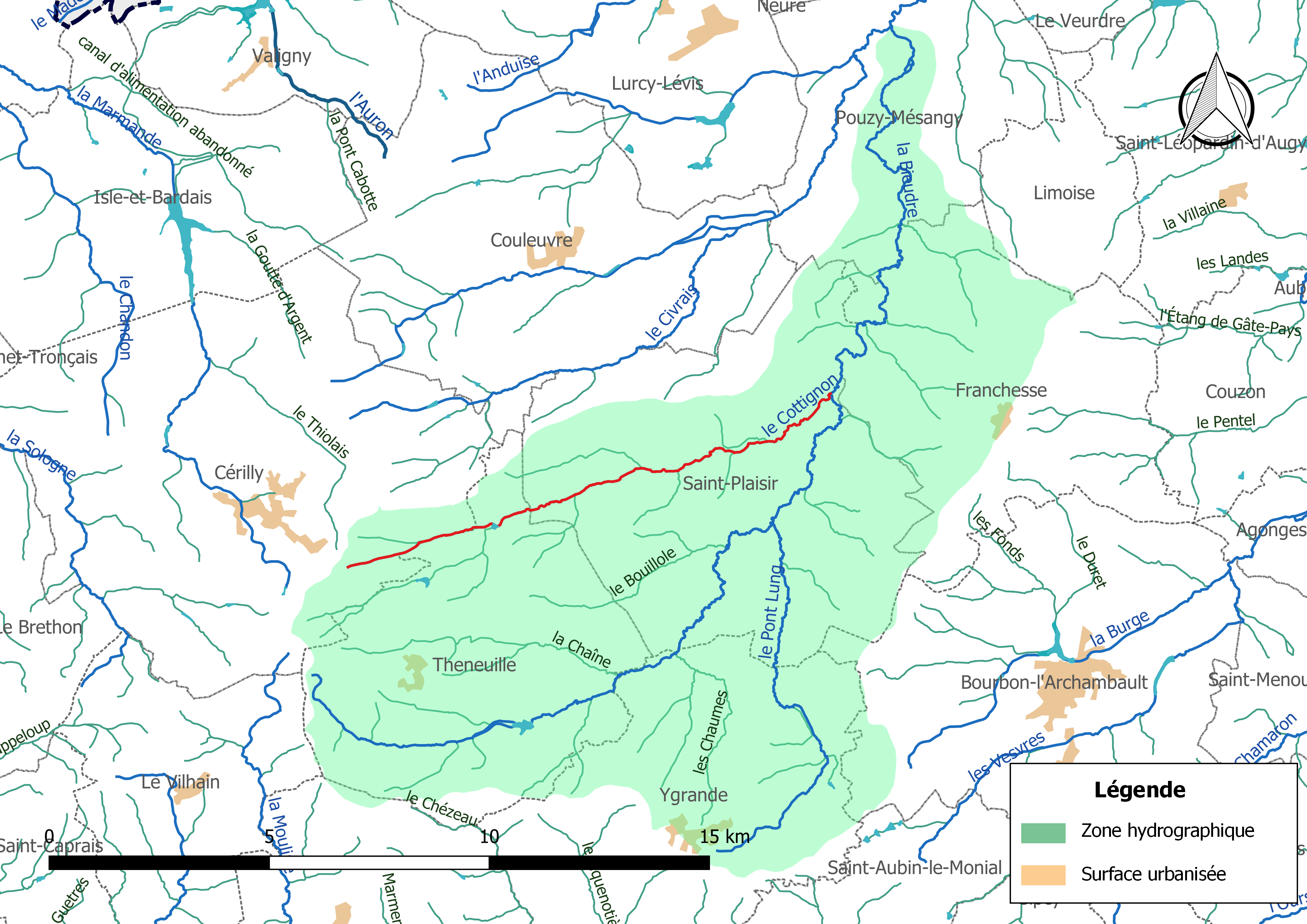 Carte du cours d'eau « le Cottignon » (France) et de la zone hydrographique dans laquelle il s'insère.